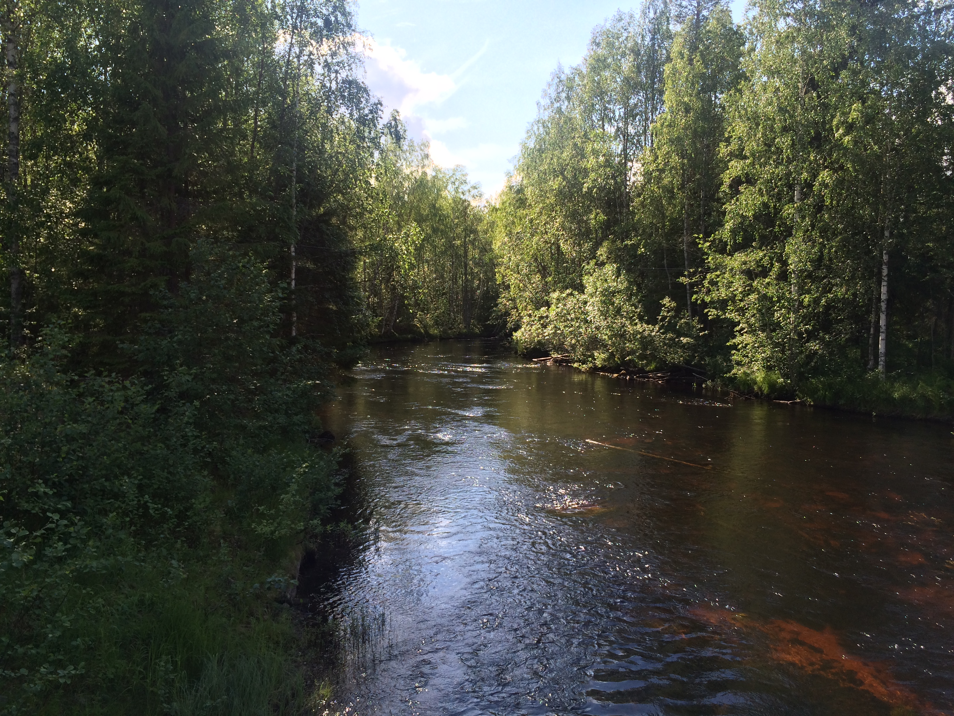 Вотто